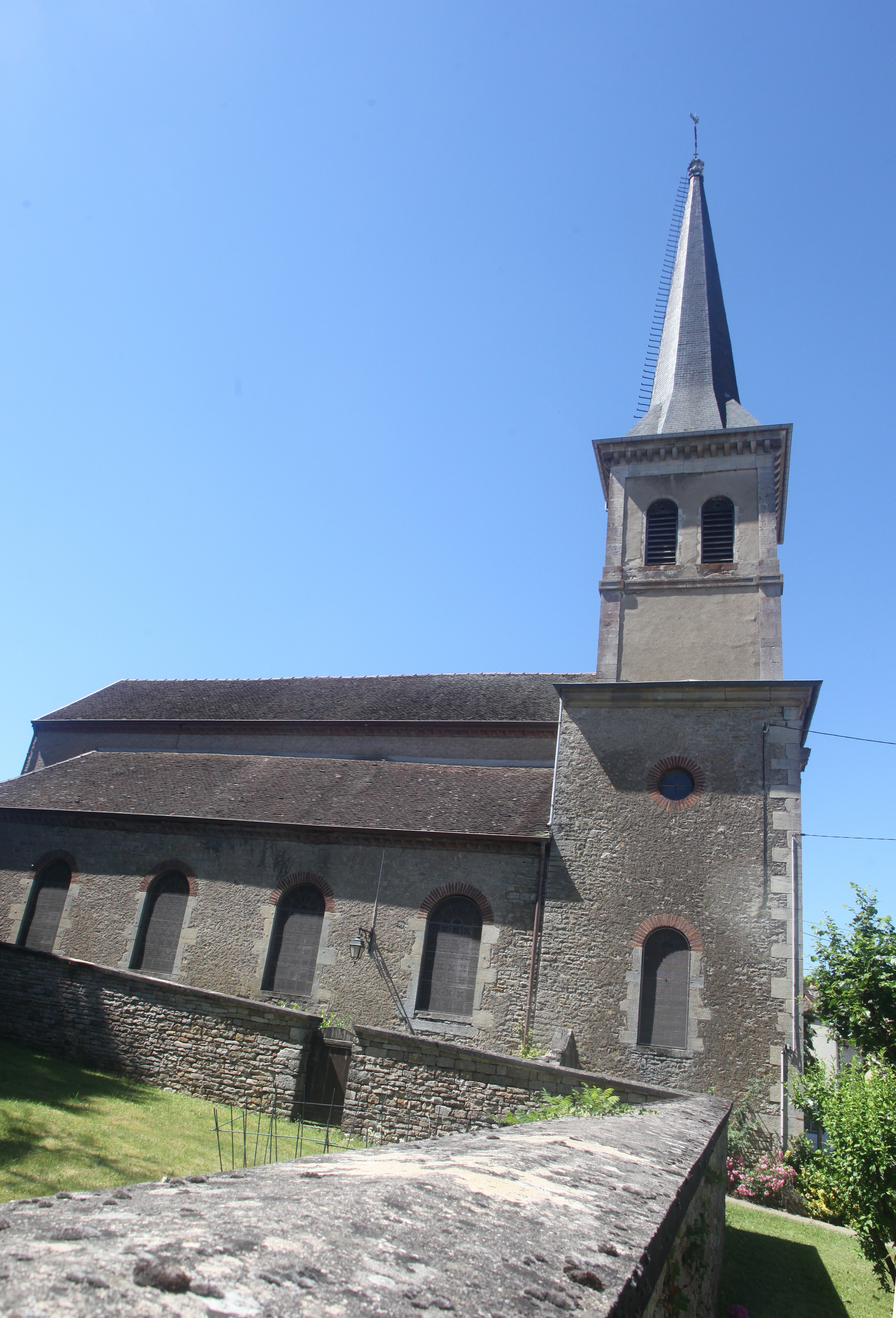 Église de Pagney (Jura).